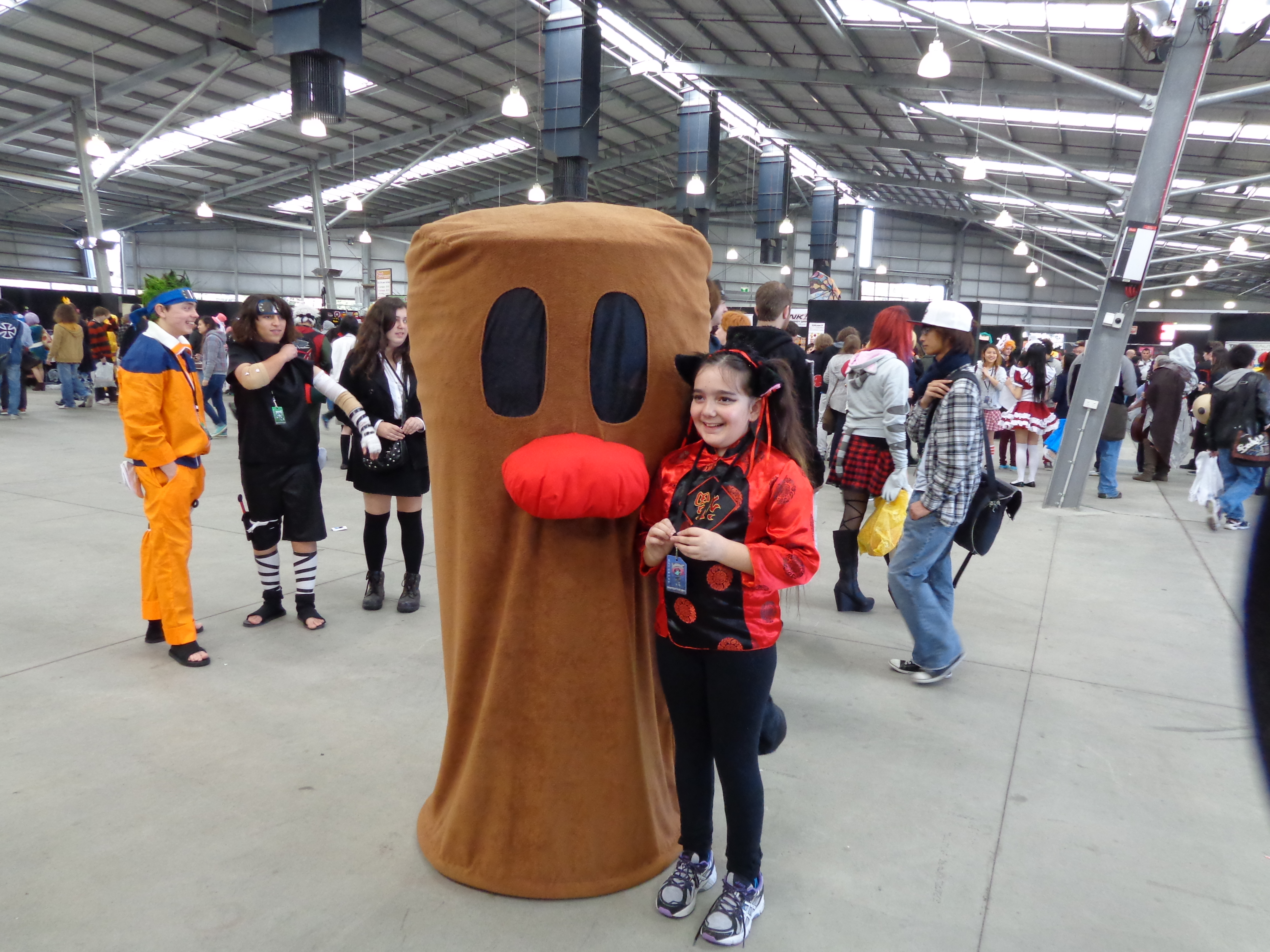 Costume de Taupiqueur